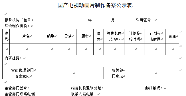 中文（中国大陆）: 中国广电总局下发